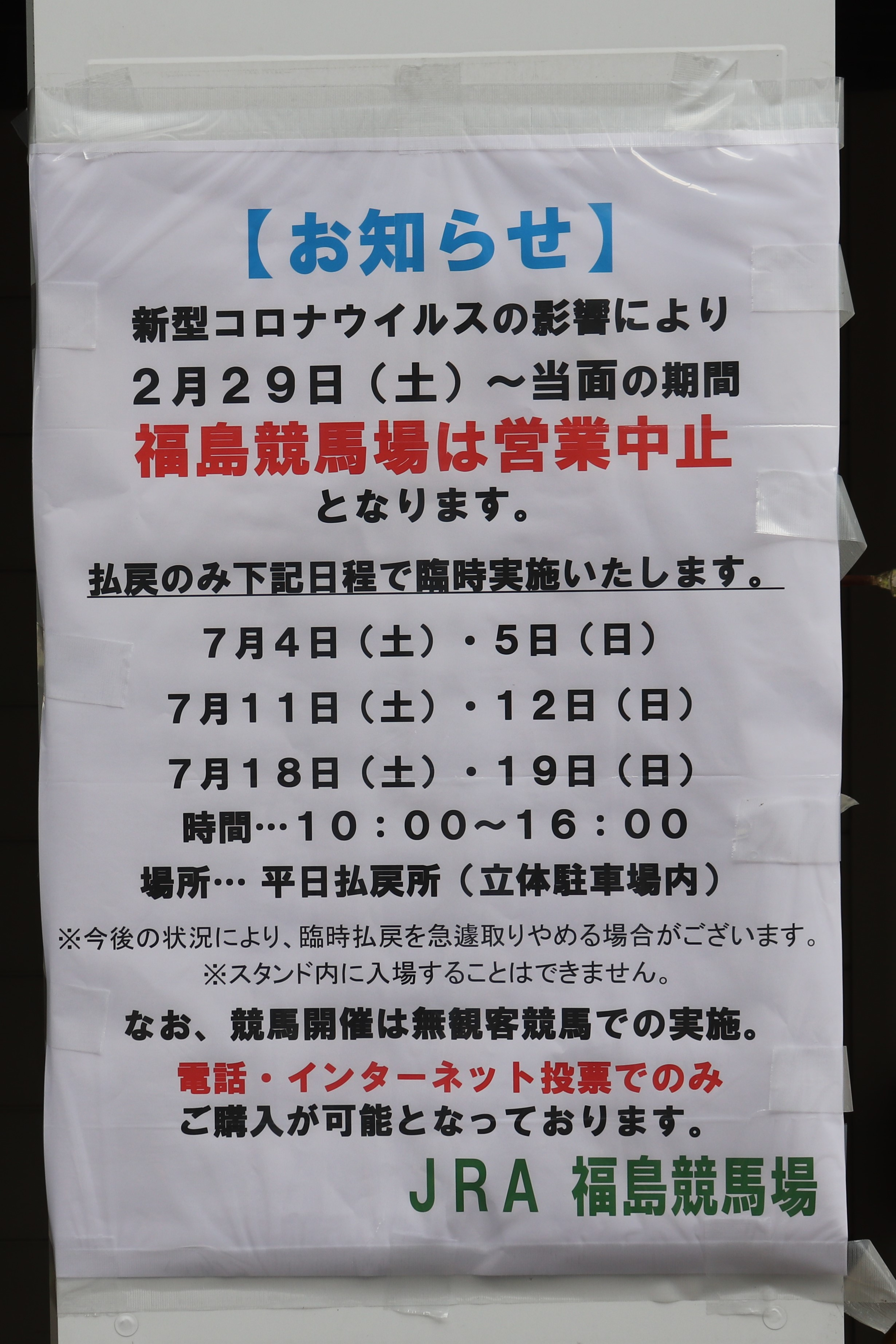 2020年の福島競馬場、コロナウイルスの流行により、営業中止。